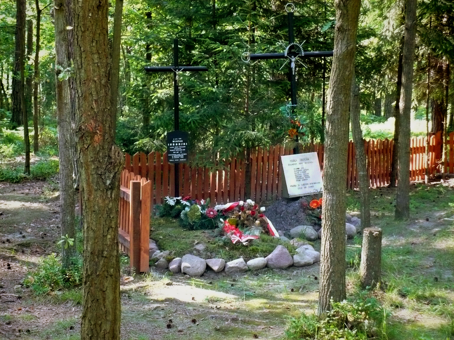 Gmina Kąkolewnica, Poland